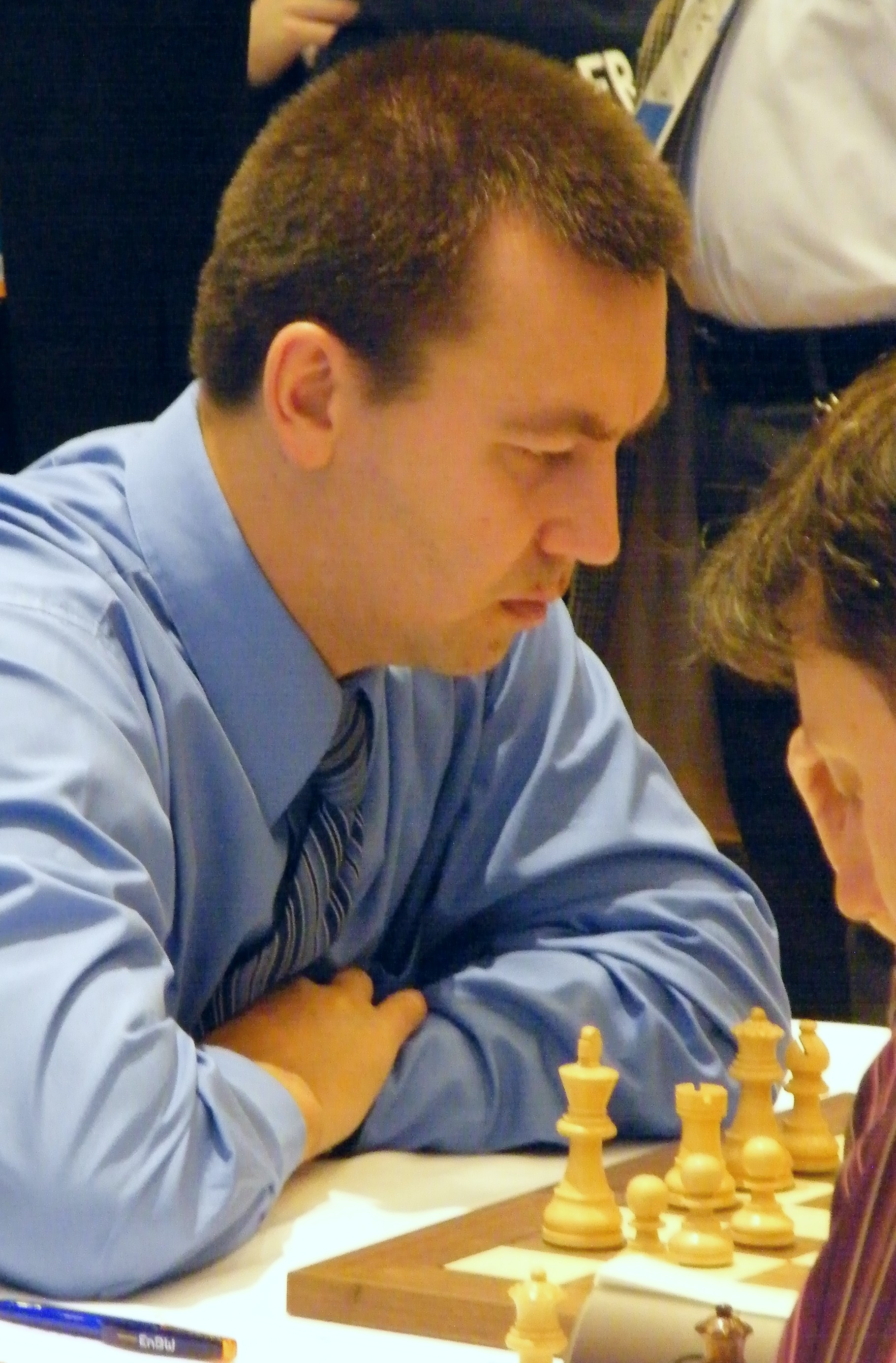 Gata Kamski bei der 38. Schacholympiade in Dresden 2008